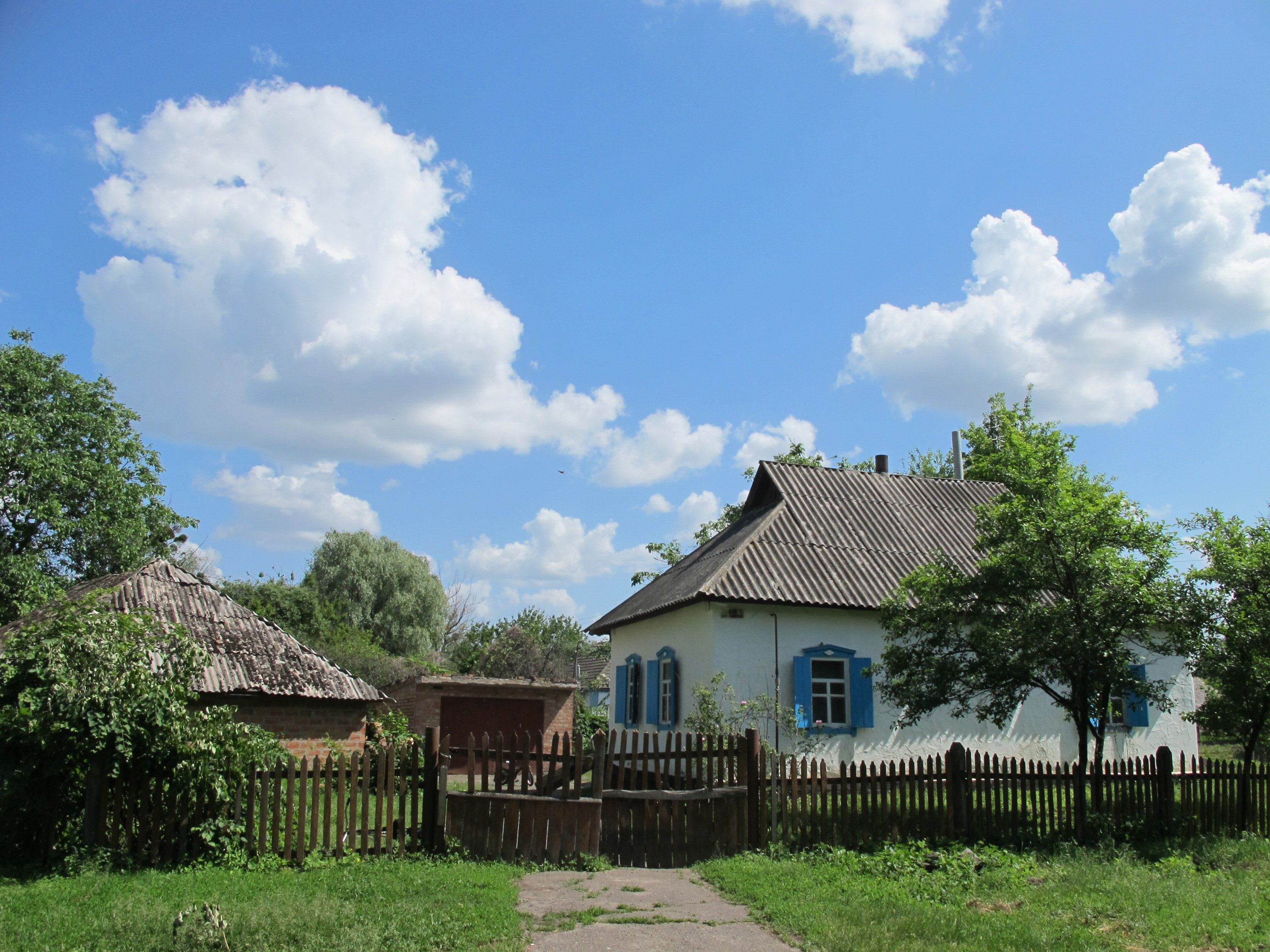 Дом в селе Пески Лохвицкого района